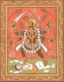 Représentation de kali, collection personnelle